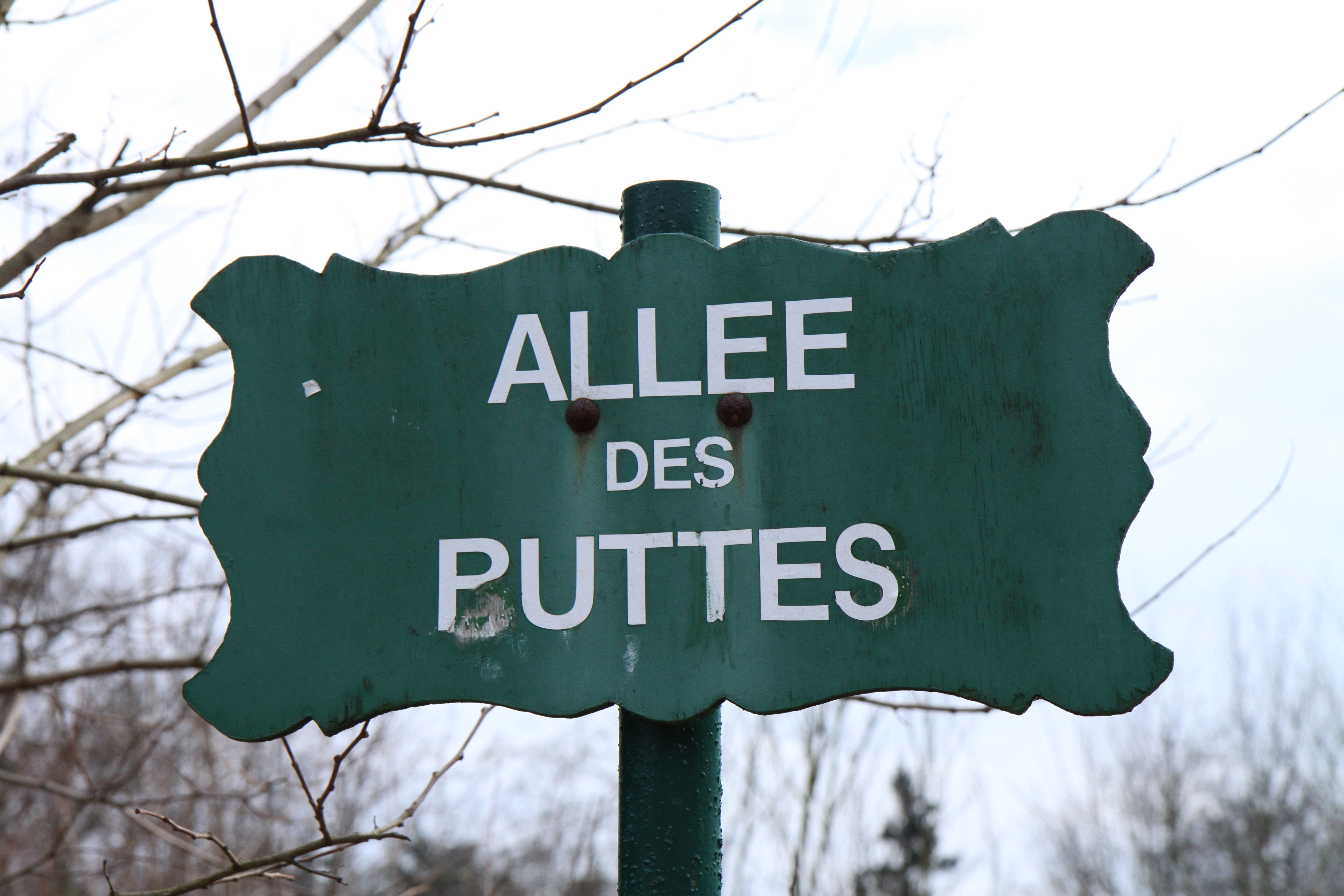 Panneau de l'Allée des Buttes, vandalisé, au bois de Vincennes.